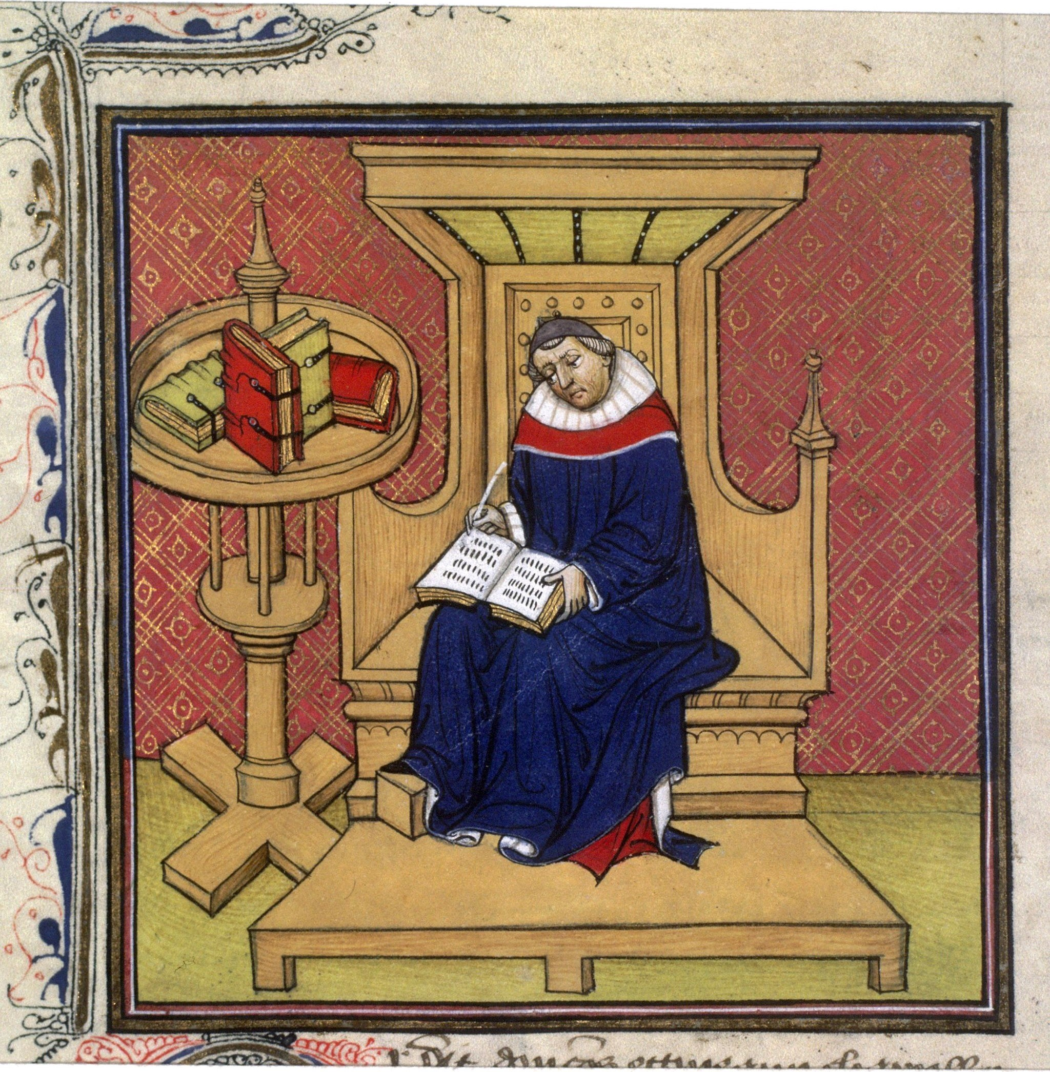 Eginhard écrivant. Grandes chroniques de France. Cote : Français 73 , Fol. 86v.